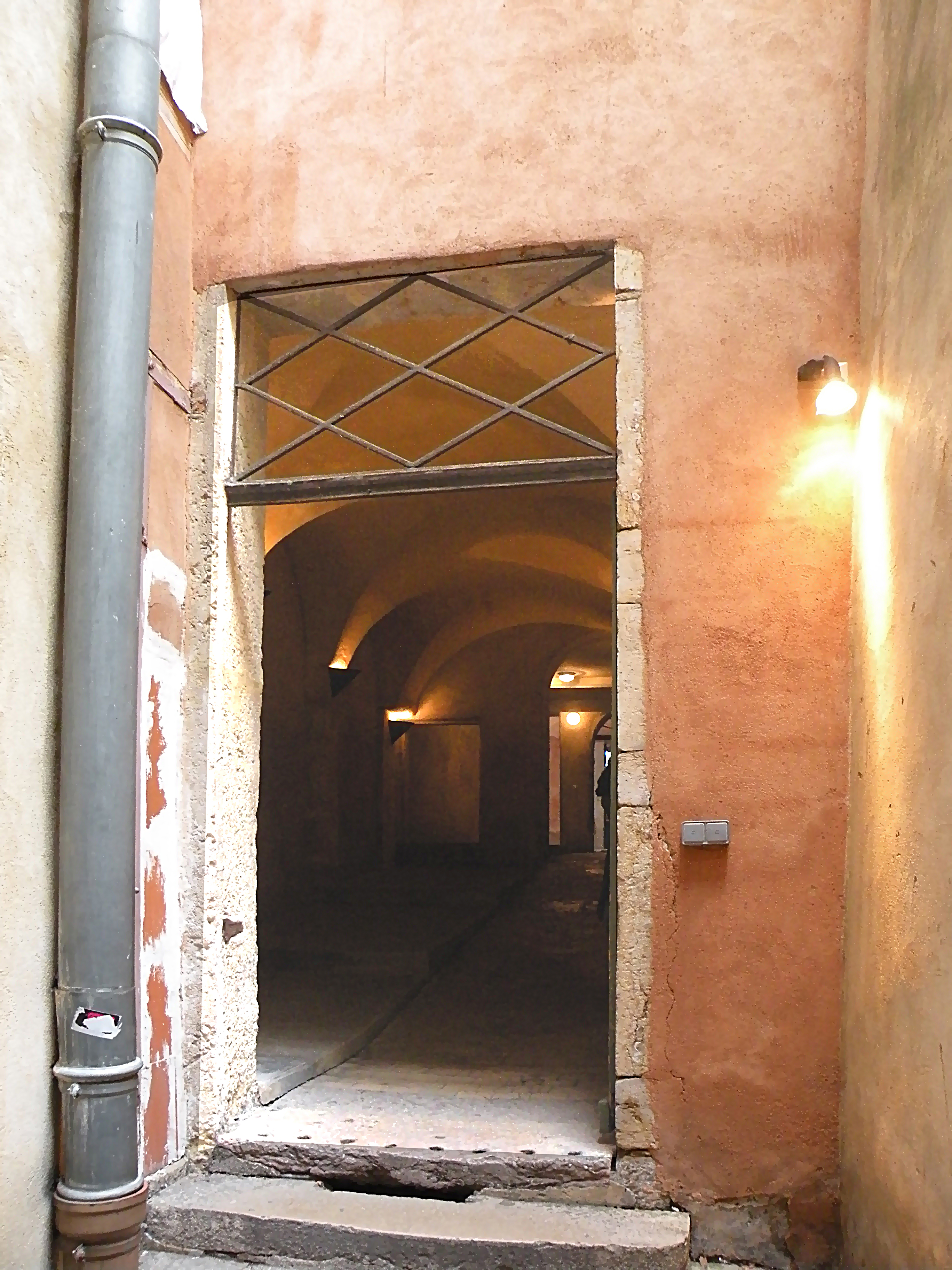 Long traboule in Lyon.